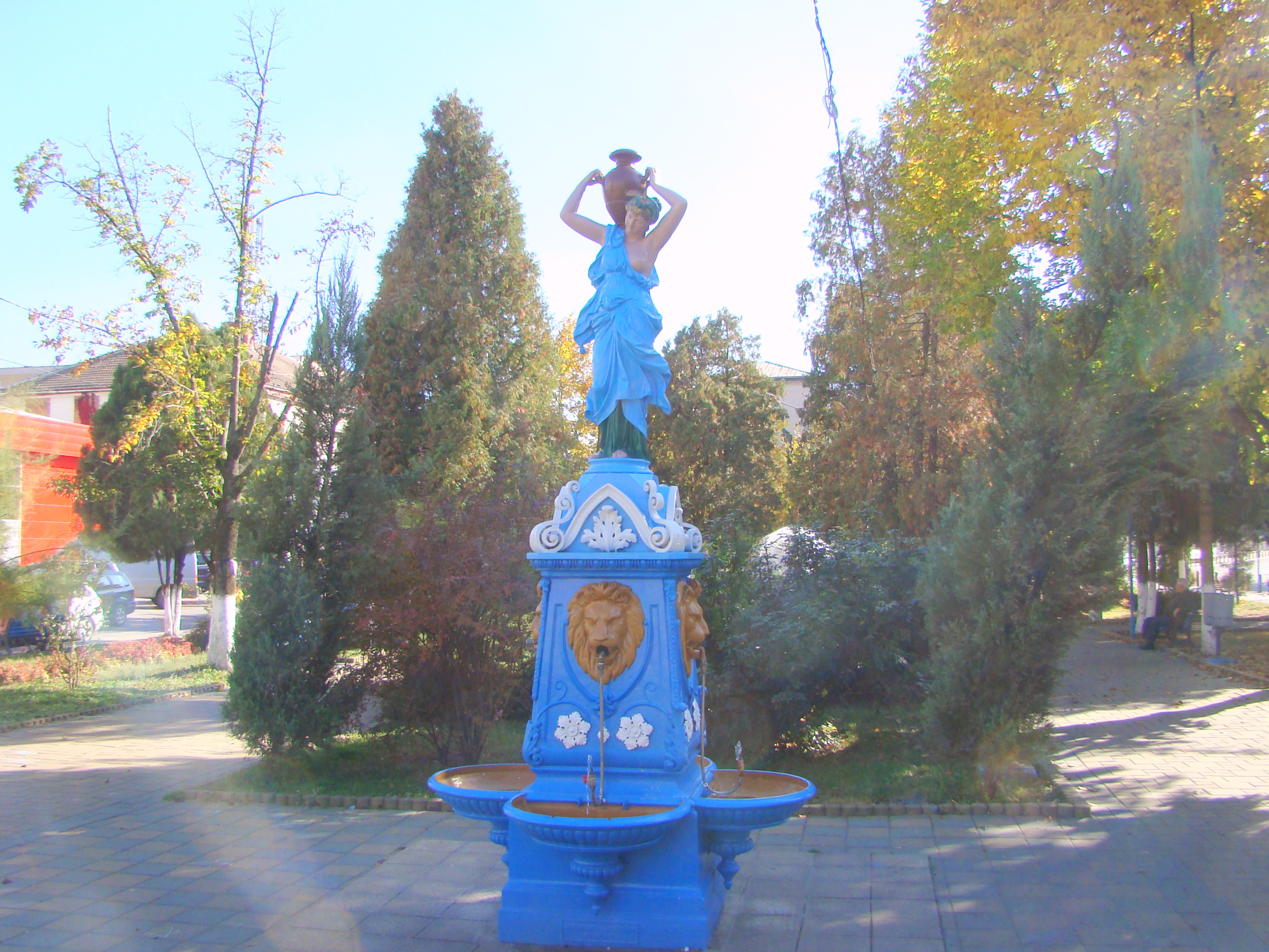 Ansamblul urban „Piața Unirii”, oraș Hațeg, Piața Unirii sec. XIX - XX 03